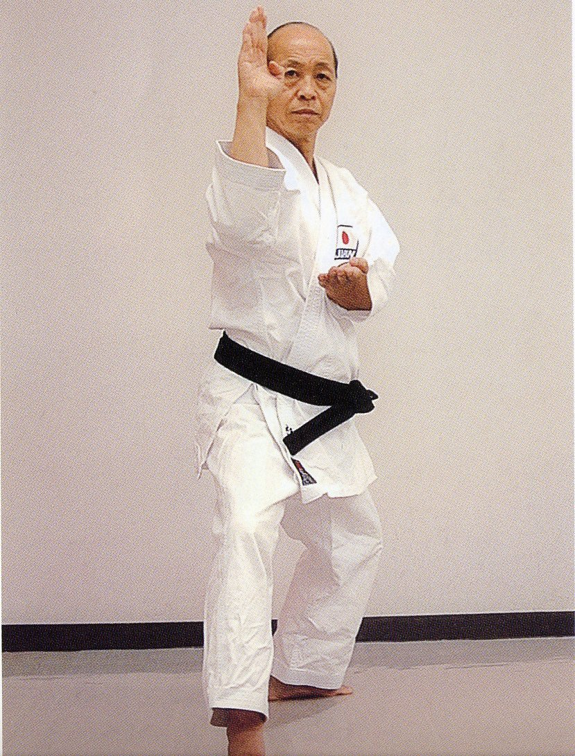 Kengo Sugiura